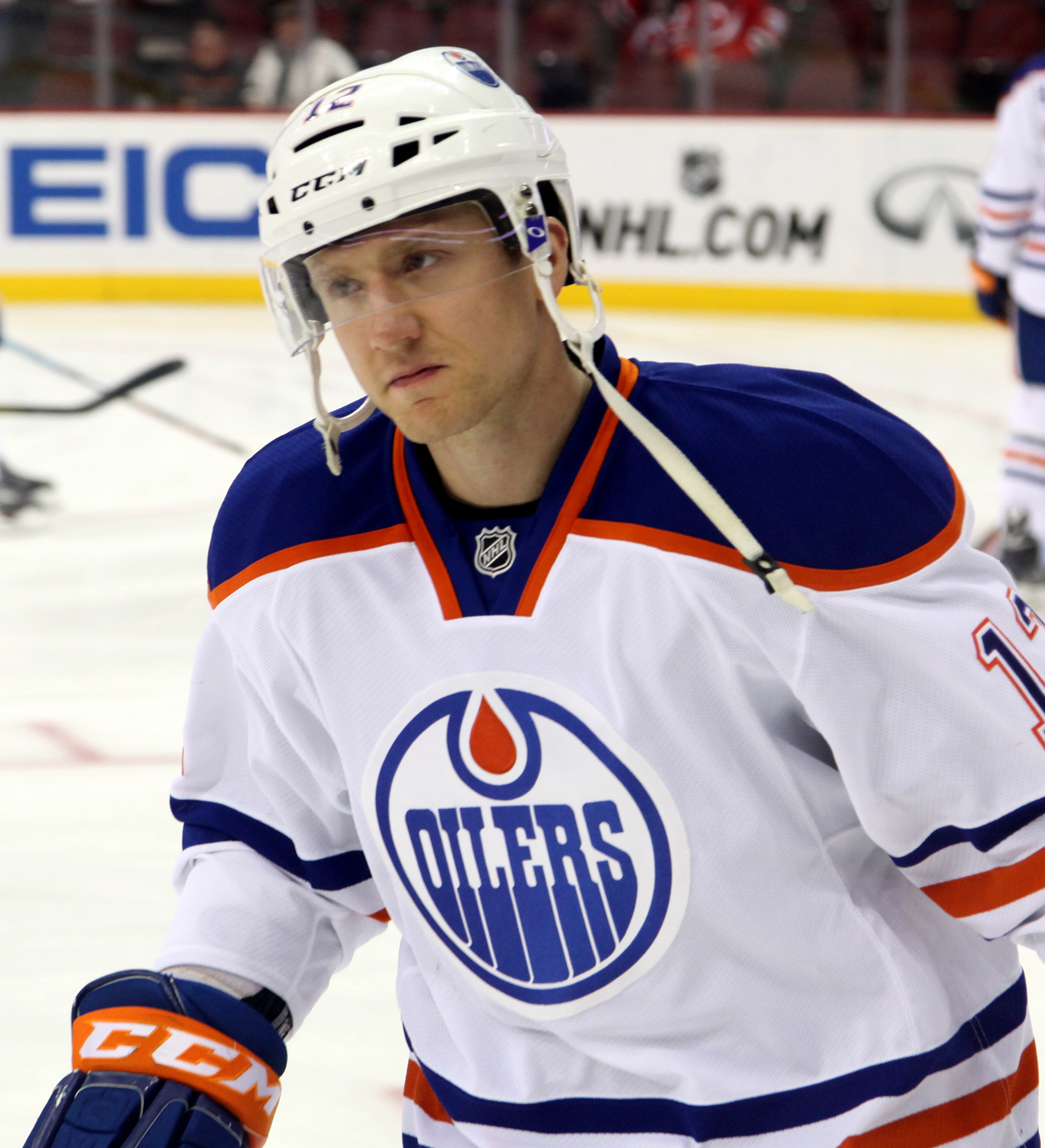 Klinkhammer in February 2015.